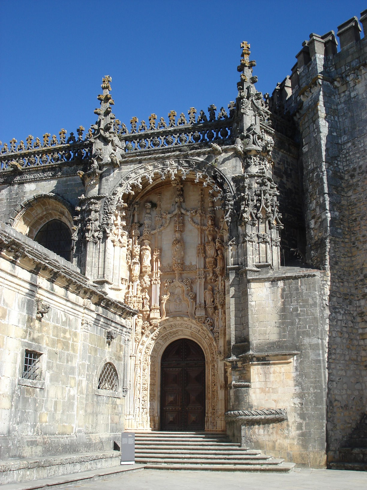 Portal construido por Juan de Castillo en 1515.